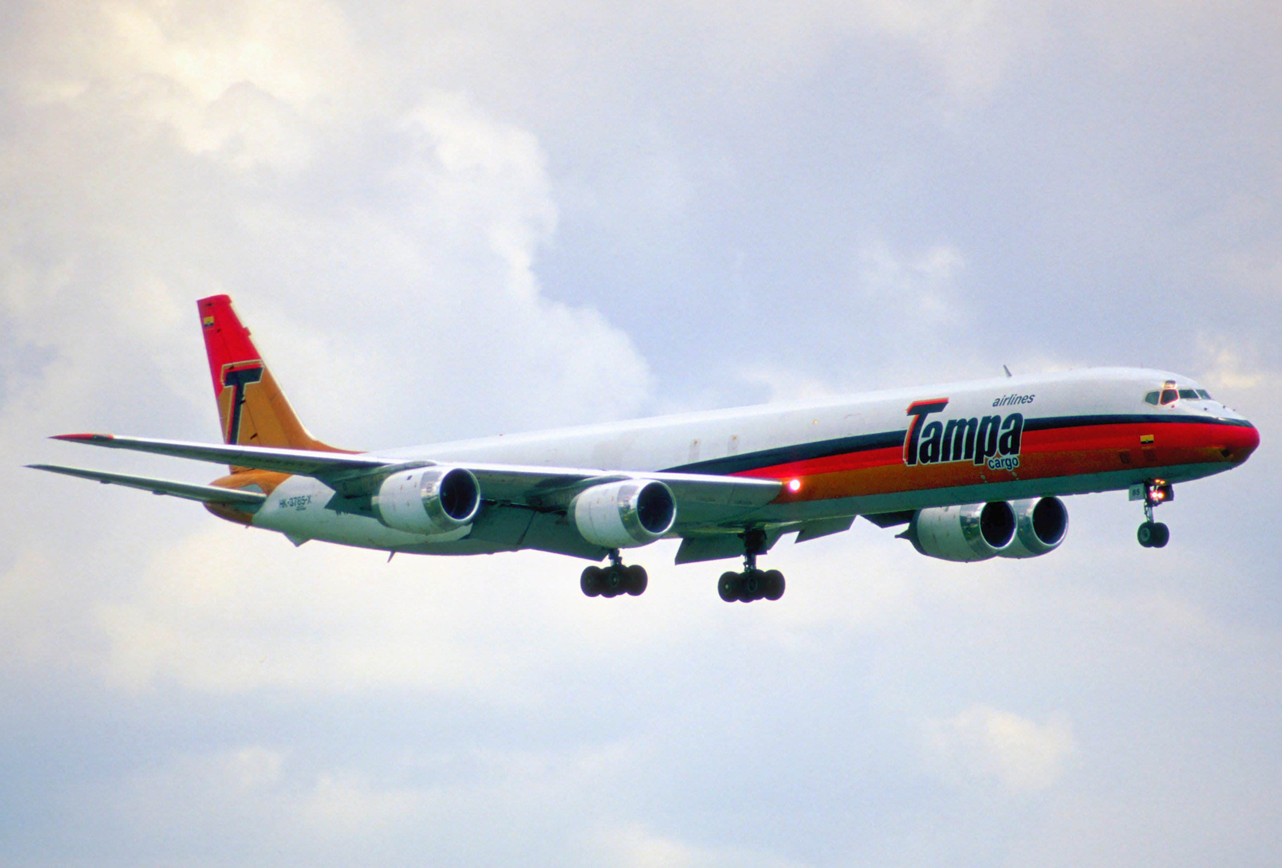 247cd - TAMPA Colombia DC-8-71F; HK-3785X@MIA;20.07.2003